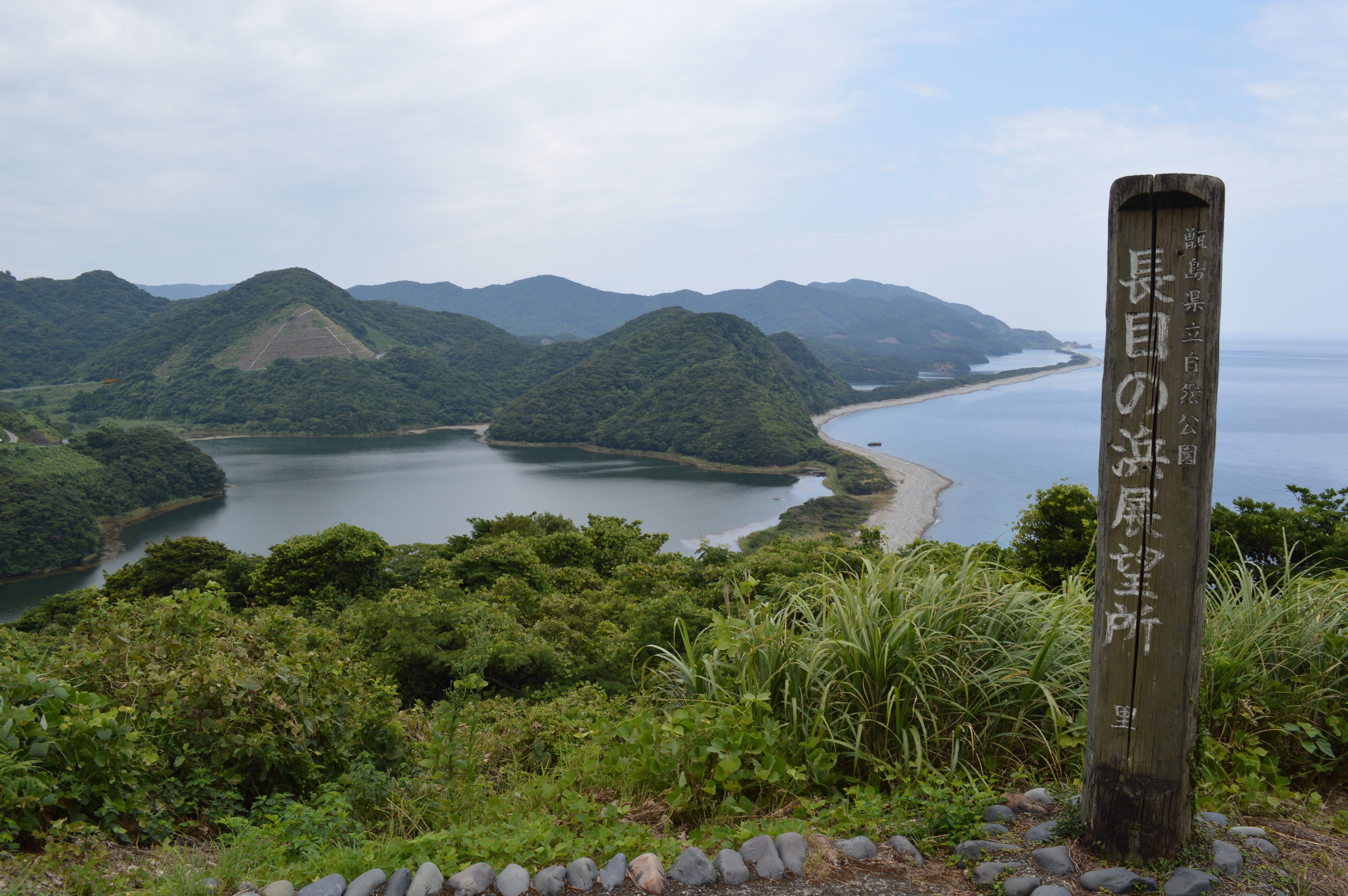 鹿児島県薩摩川内市の上甑島、長目の浜展望所から見た長目の浜